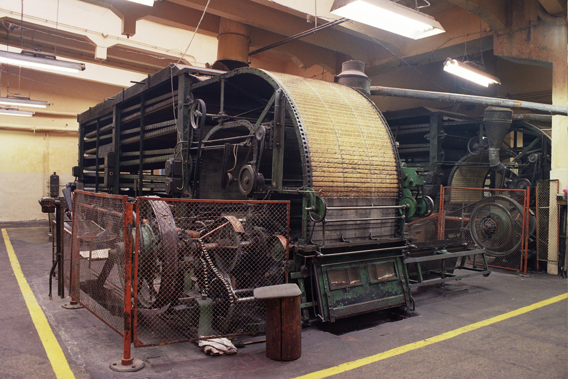 Muzeum produkcji zapałek w Częstochowie - automat zapałczany Author: Przykuta Date: december 2005